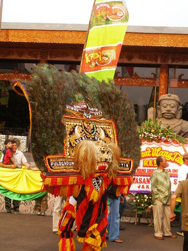 Reog dancer, Ponorogo, East Java, Indonesia